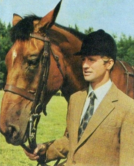 SPORT VEDETTES-PANINI 1974-Figurina n.94- MEADE - GR.BRETAGNA -EQUITAZIONE-Rec